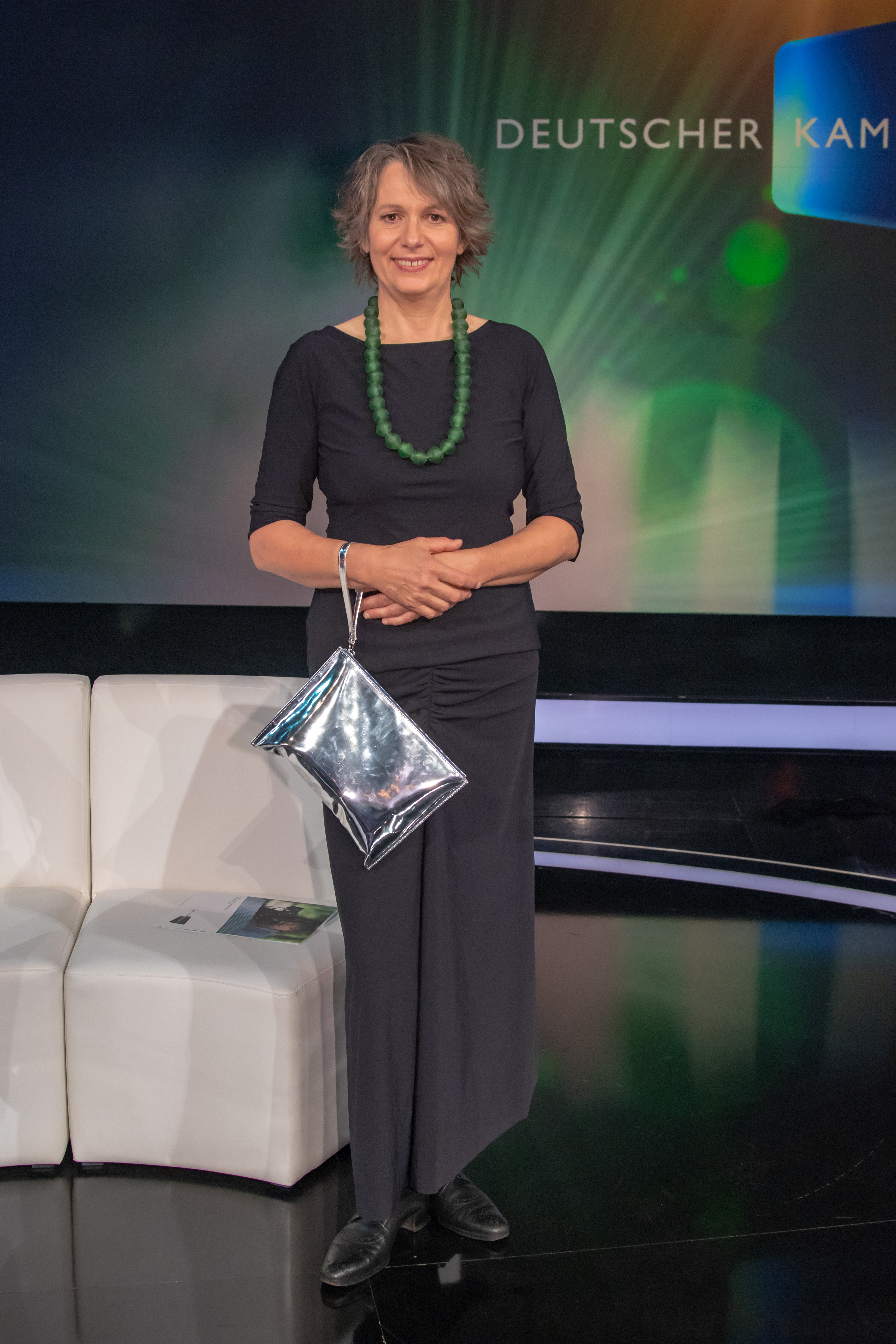 Deutscher Kamerapreis 2018 - Ehrenpreisträgerin Birgit Gudjonsdottir